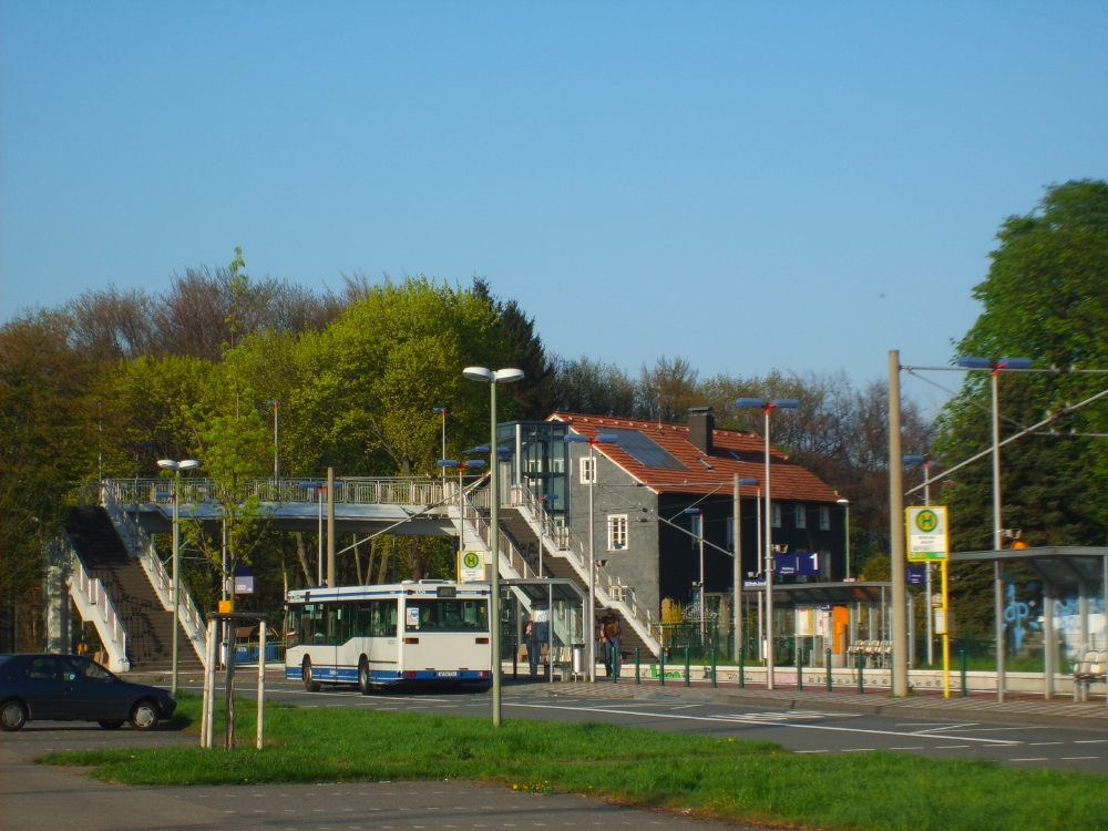 Haltepunkt Wülfrath-Aprath, Germany